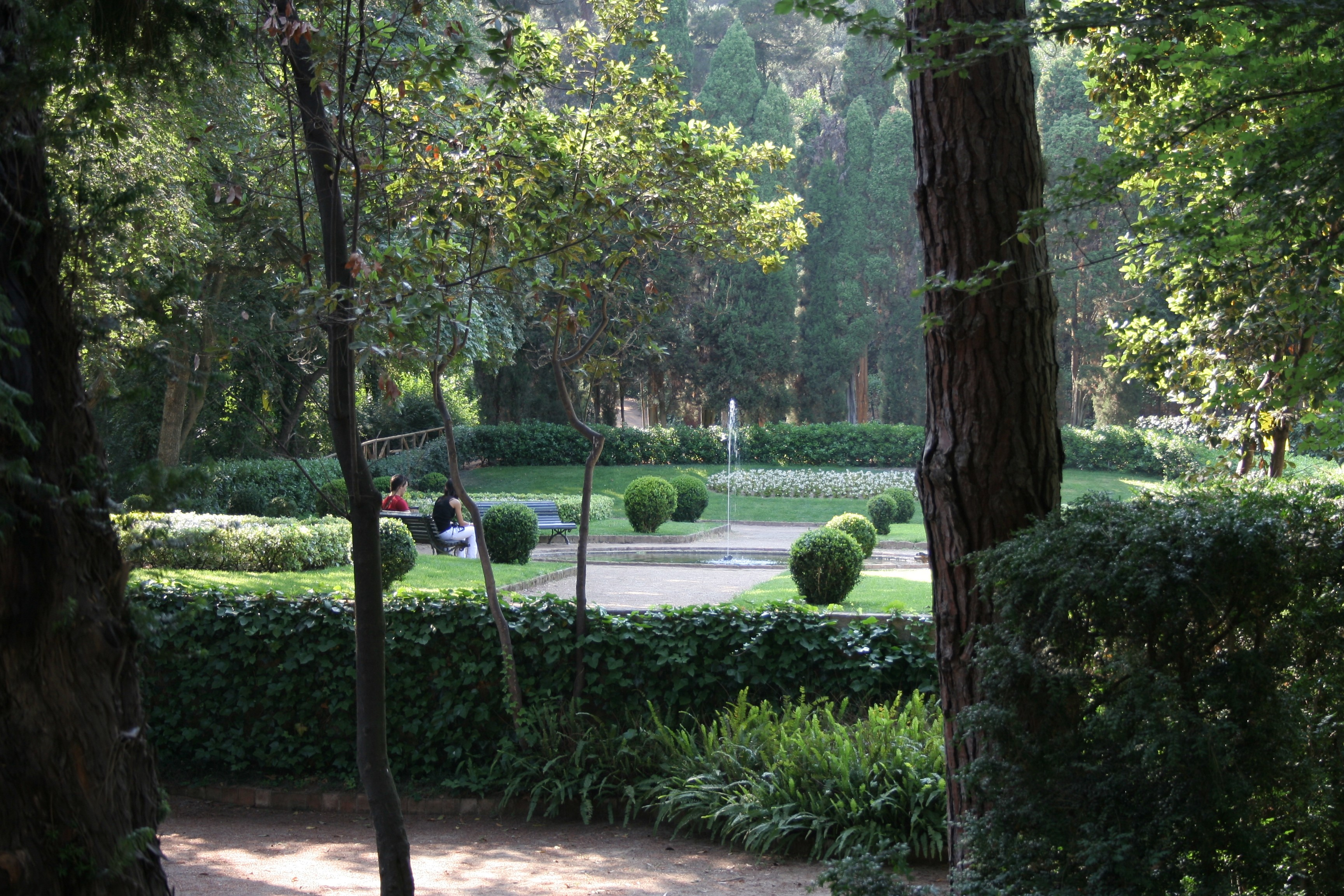 Jardines del siglo XVIII